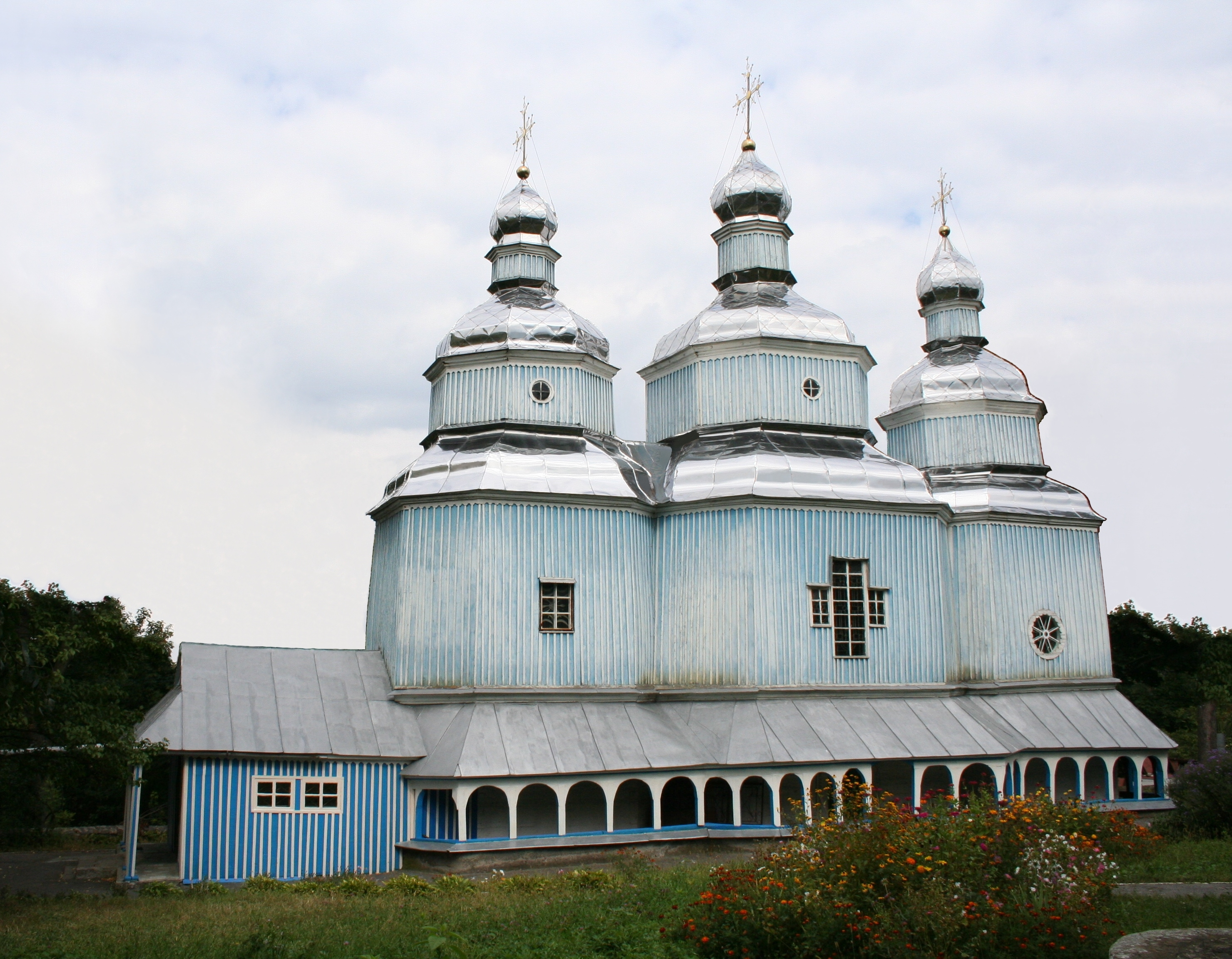 Україна Вінниця, Миколаївська ц-ва 1746 року (1)